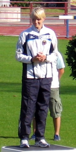 Minna Nikkanen yleisurheilun 22-vuotiaiden SM-kisoissa Porin stadionilla